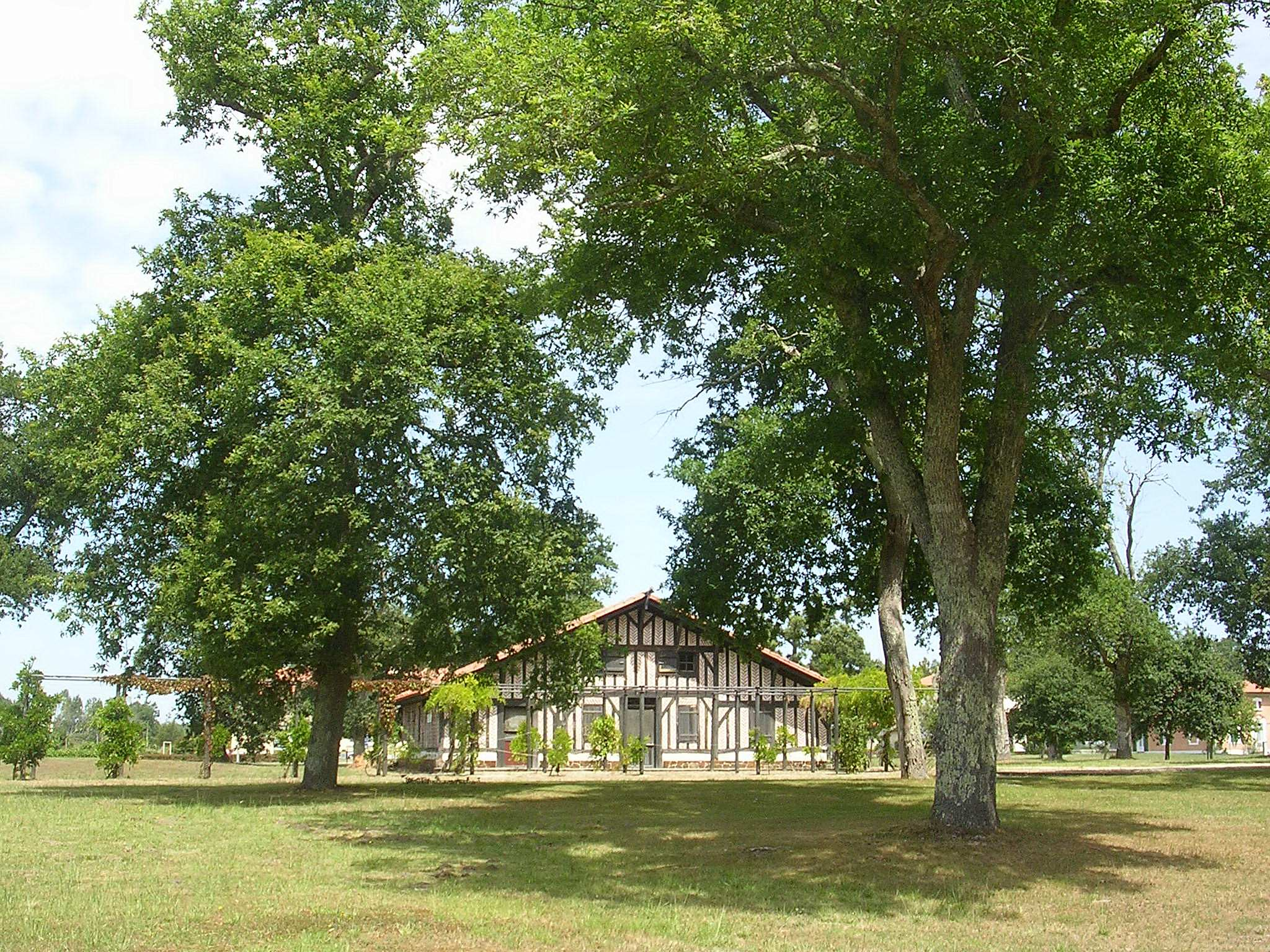 Maison de l'airial de Bias, dans le département français des Landes